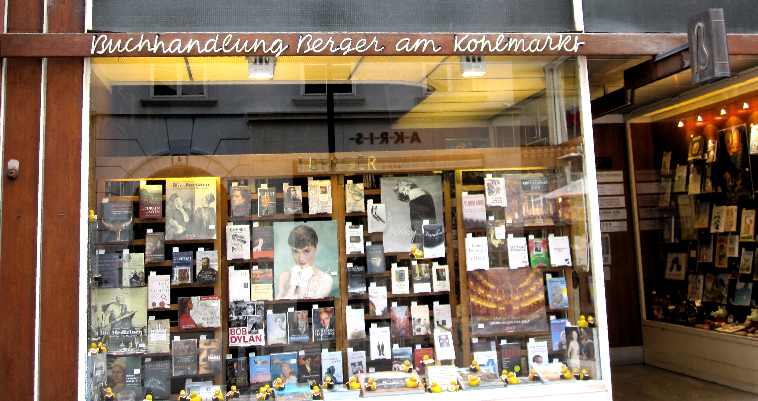 Schaufenster der Buchhandlung Berger am Kohlmarkt im 1. Wiener Gemeindebezirk Innere Stadt